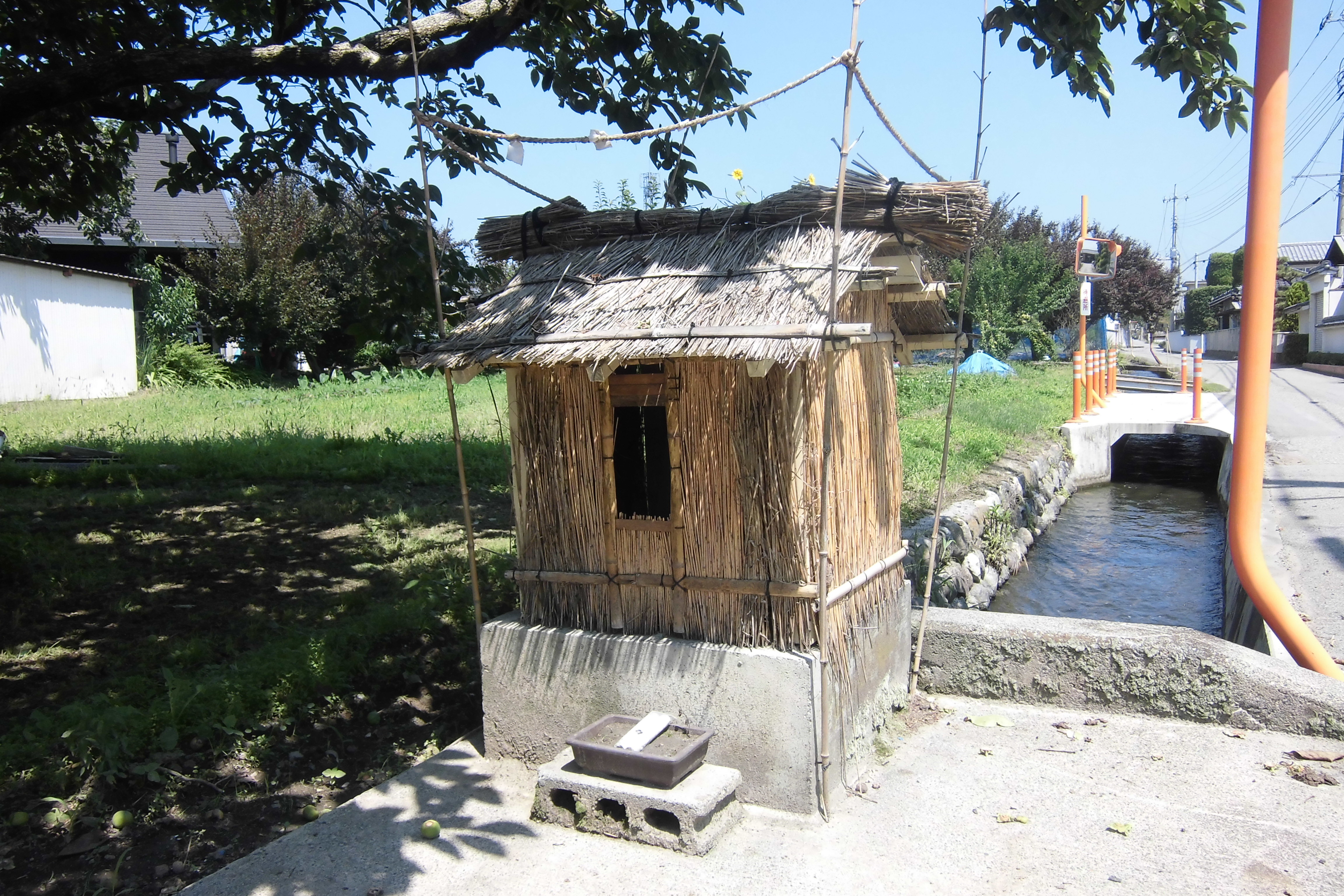 九頭龍神祠（山梨県南アルプス市上高砂）